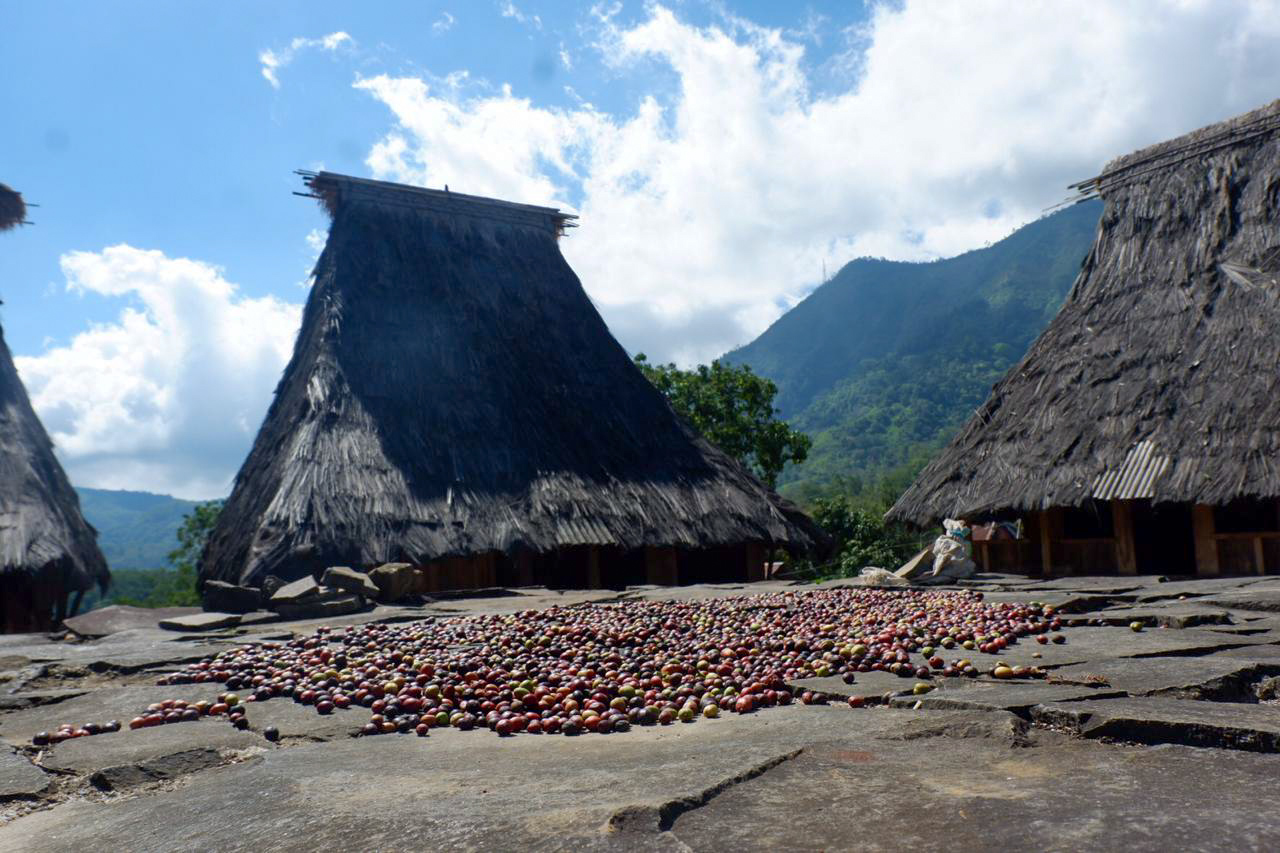 Desa Adat Wologai adalah salah satu kampung adat di Kabupaten Ende, Flores, Nusa Tenggara Timur yang masih terjaga tradisinya. Deretan rumah adat menjadi daya tarik utama desa ini. Selain rumah adat, kopi Wologai juga menjadi alasan utama para wisatawan ke Wologai.